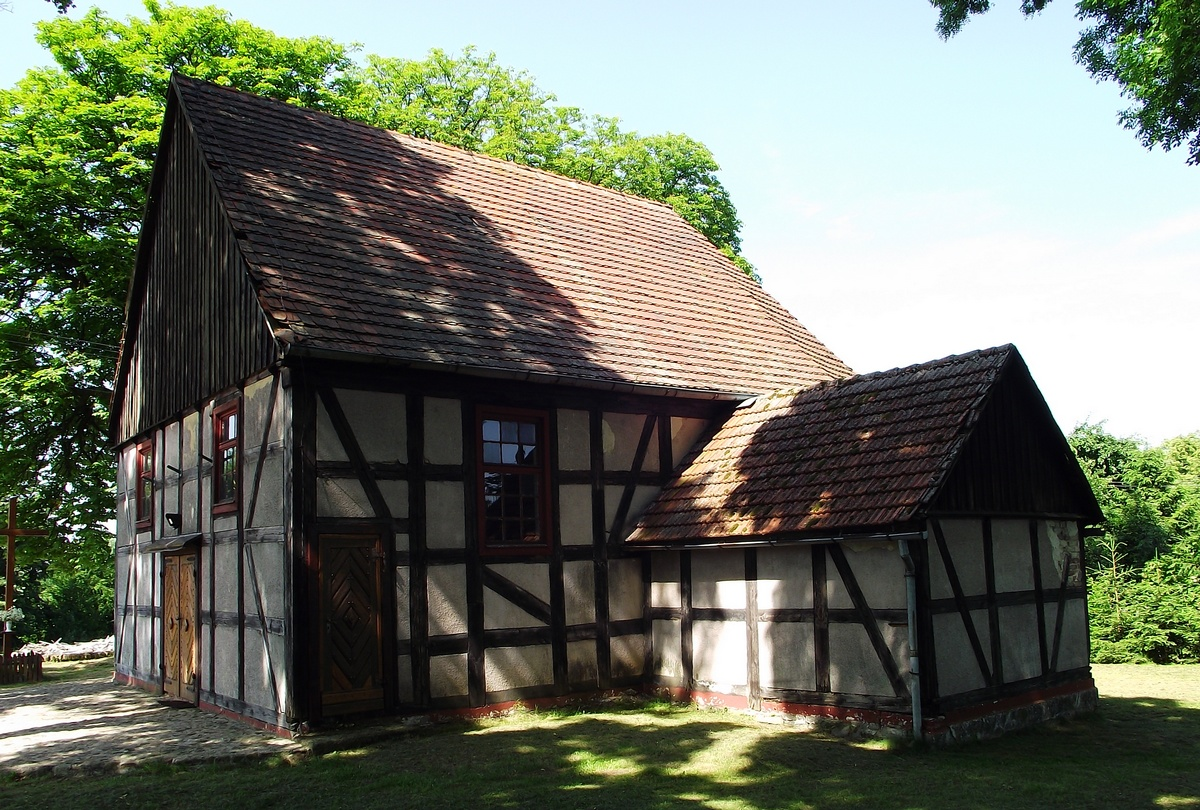 Zdbowo - rzymskokatolicki kościół filialny p.w. św. Józefa, 1817